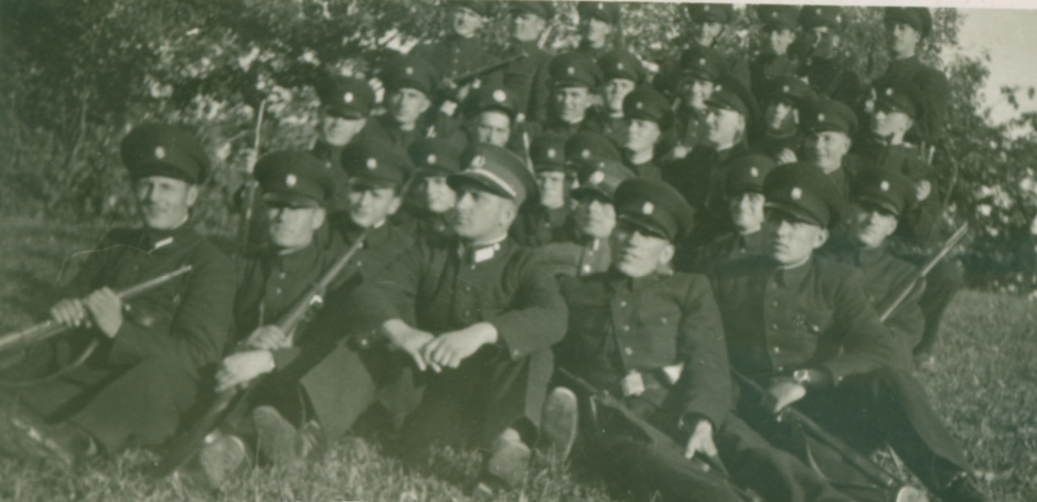 oružnici 1941.